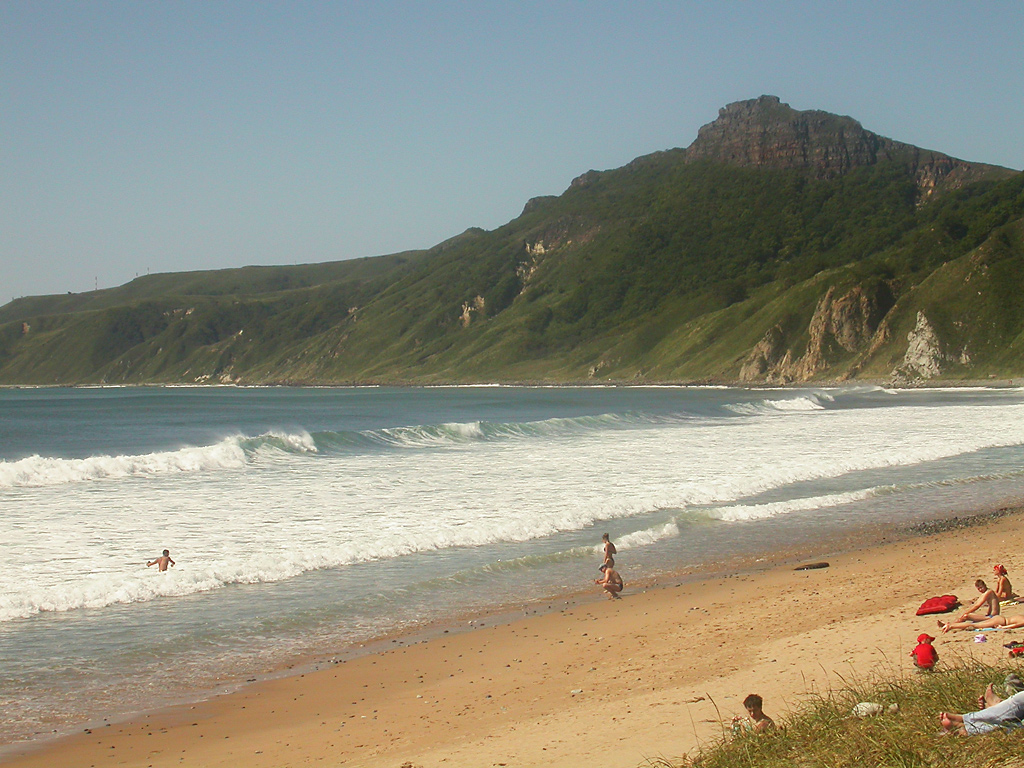 Nakhodka, Autumn, 2003